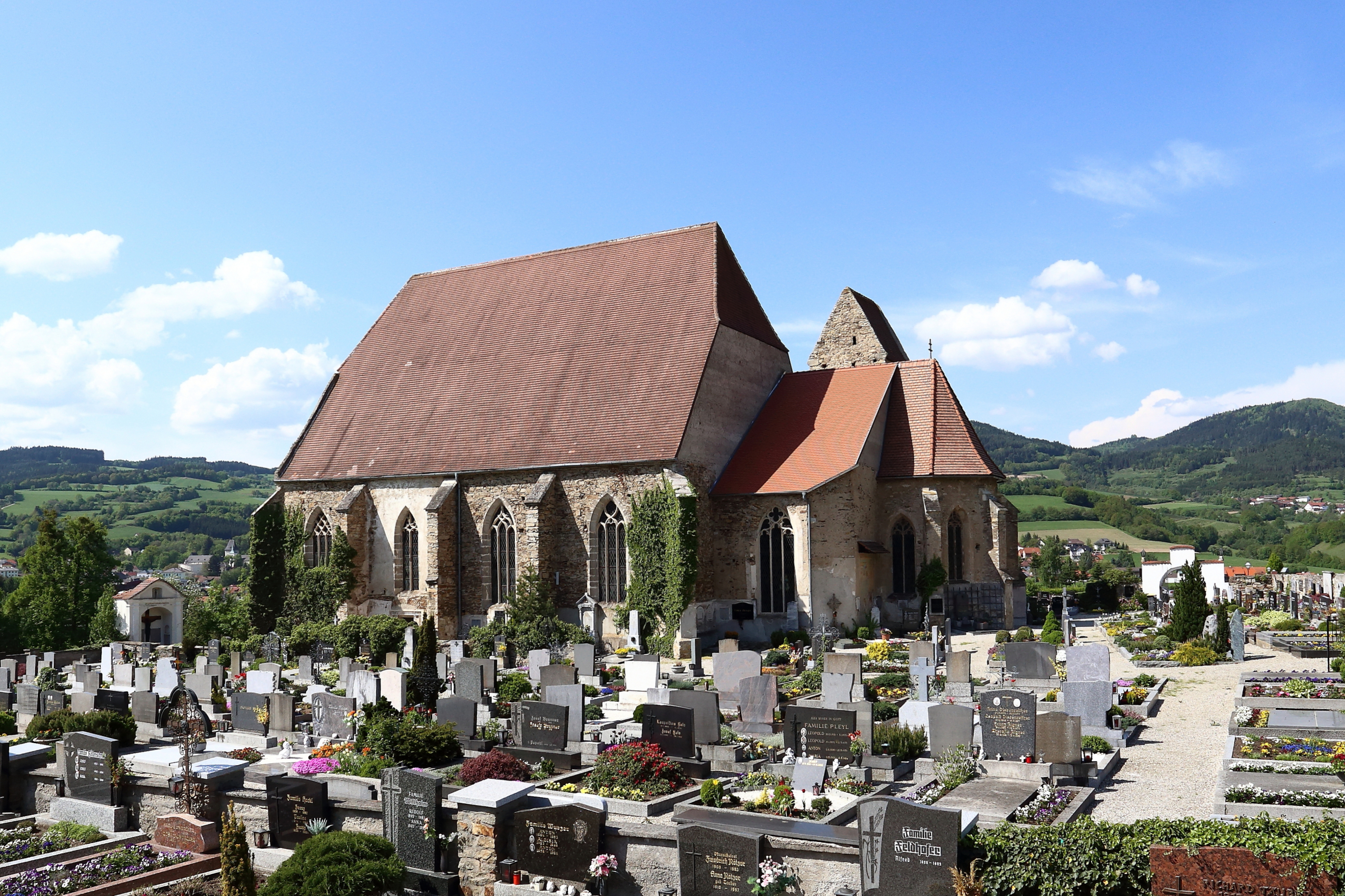 Katholische Filialkirche hl. Anna im Felde in der niederösterreichischen Marktgemeinde Pöggstall.